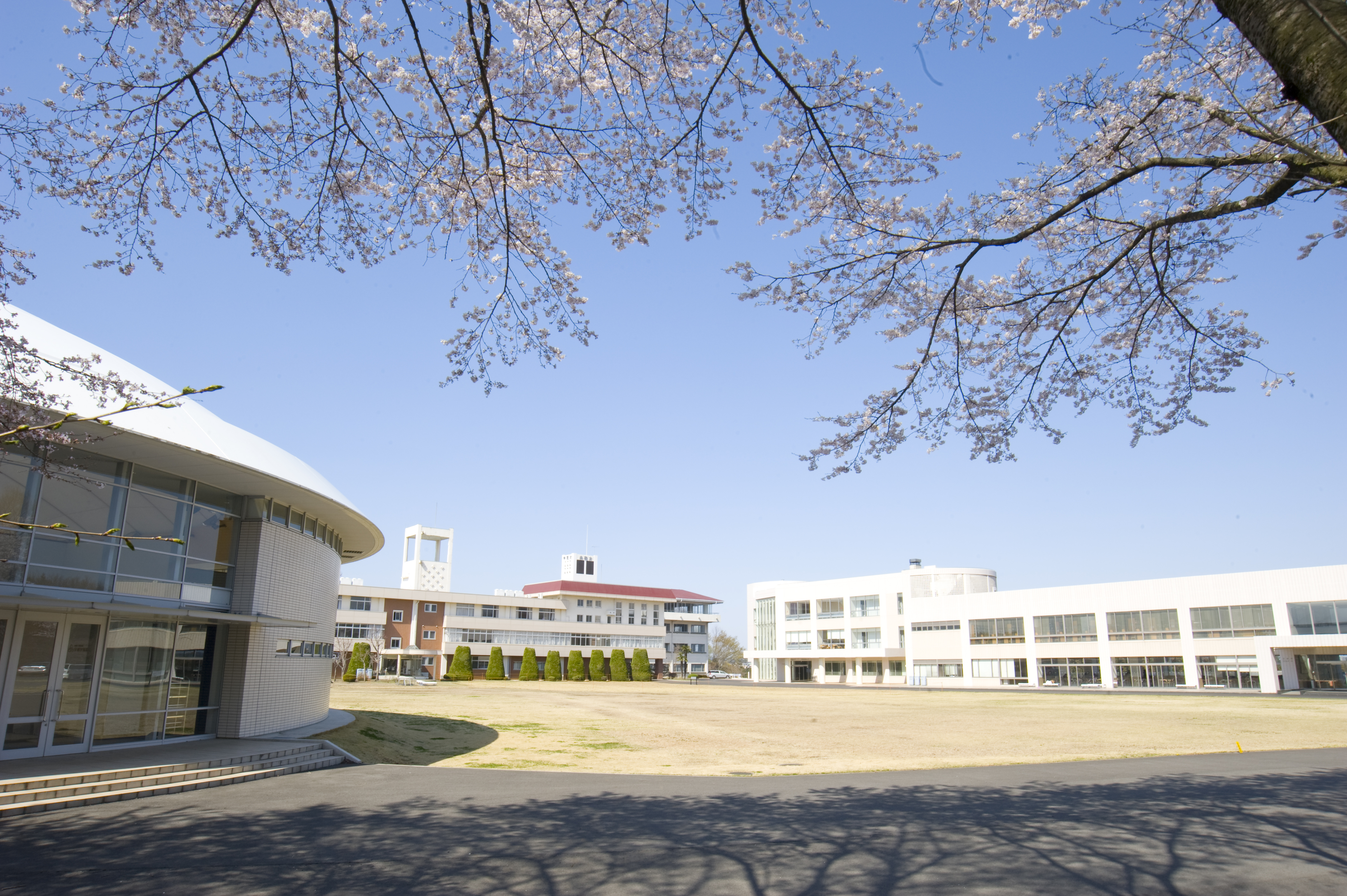 宇都宮短期大学